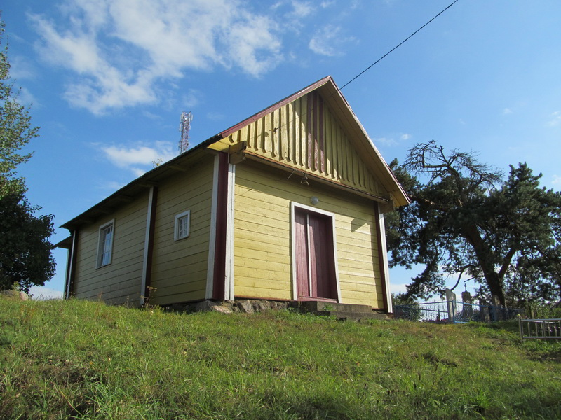 Юшавічы. Царква